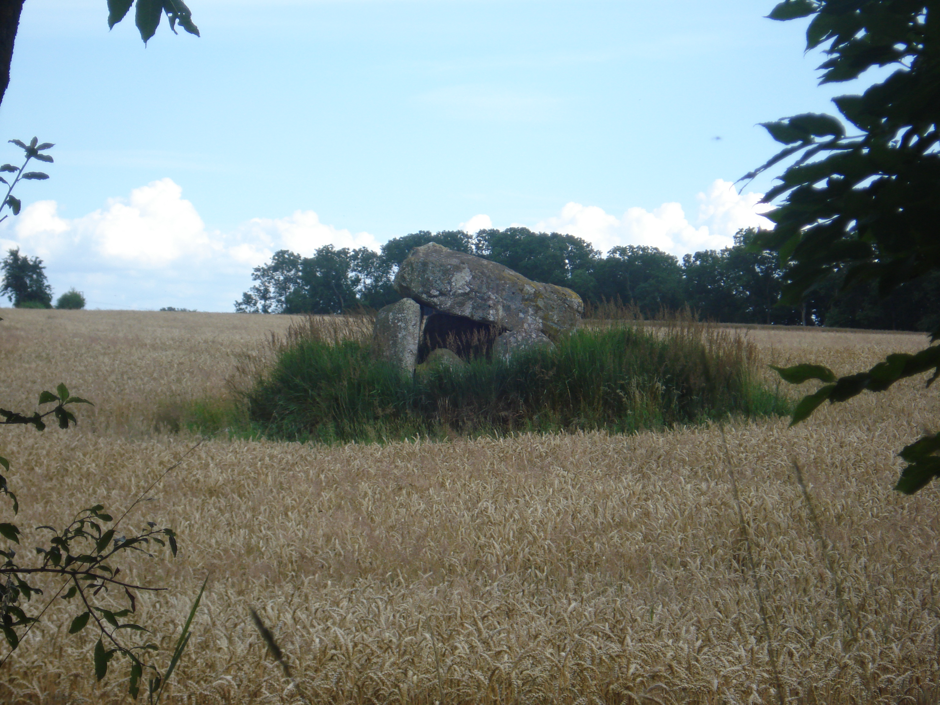 Fastmårupsdösen (Fjärestad 2:1)